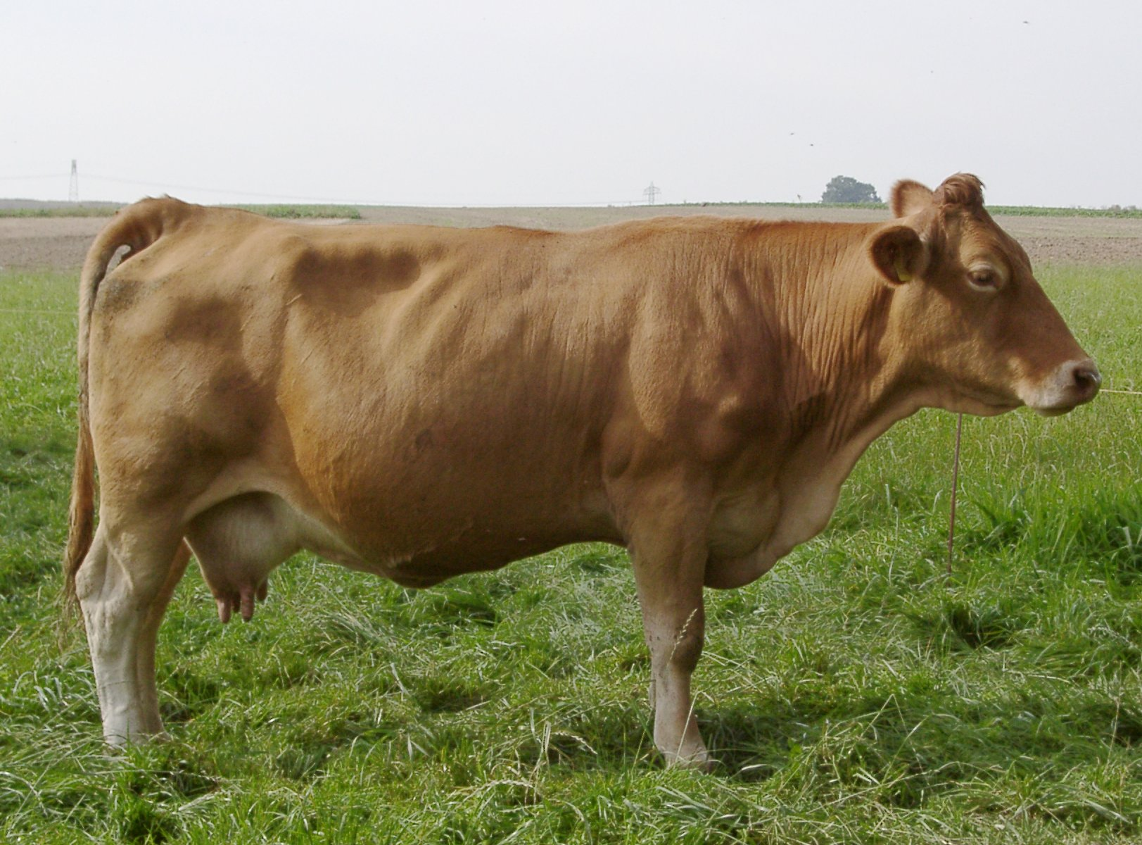 Gelbviehrind, selbst fotografiert, --mw 10:49, 2. Sep 2005 (CEST)